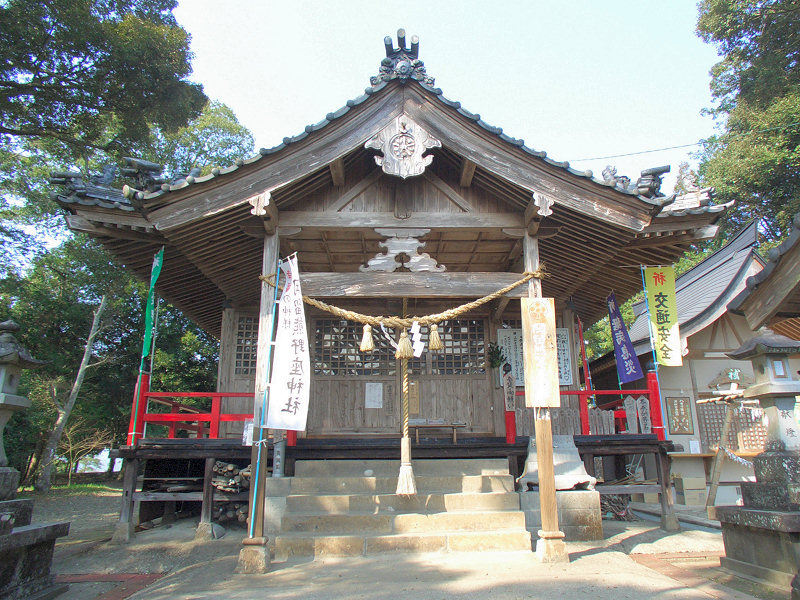 岡留熊野座神社 撮影者/著者/著作権保有者 : MK Products (本人がアップロード) 撮影日 : 2007/03/22 おかどめ幸福駅用にアップロードした画像です。良い画像があれば別の画像に変えてください。